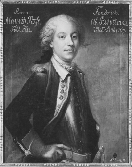 Friherre Mauritz Posse, Född 1712, Död 1784.